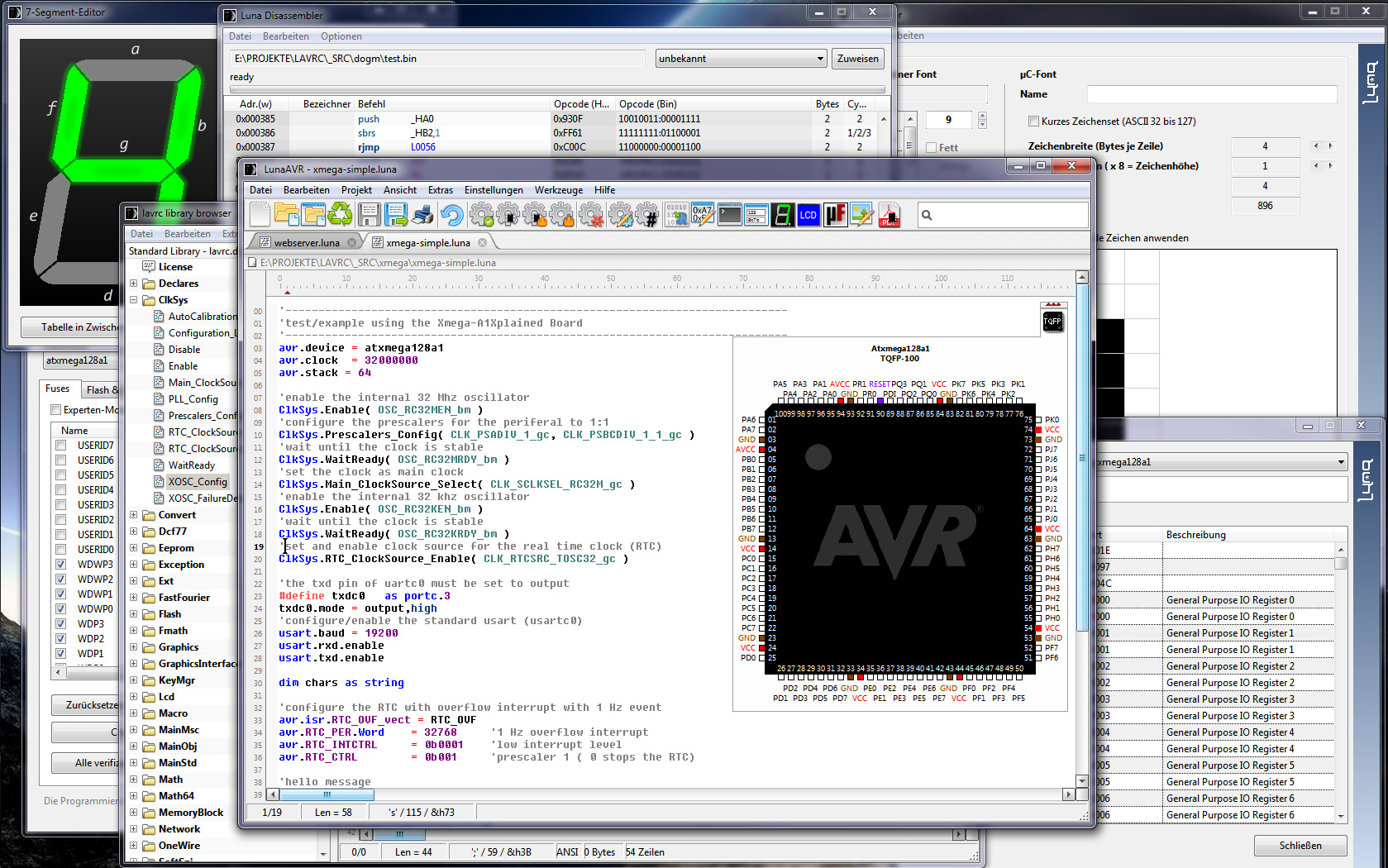 Screenshot Luna AVR Entwicklungsumgebung